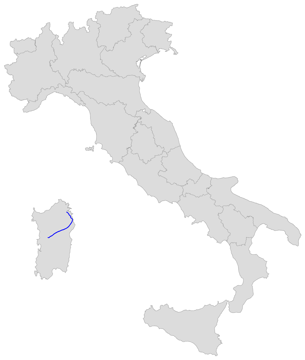 Percorso della SS 131 d.c.n. Diramazione Centrale Nuorese